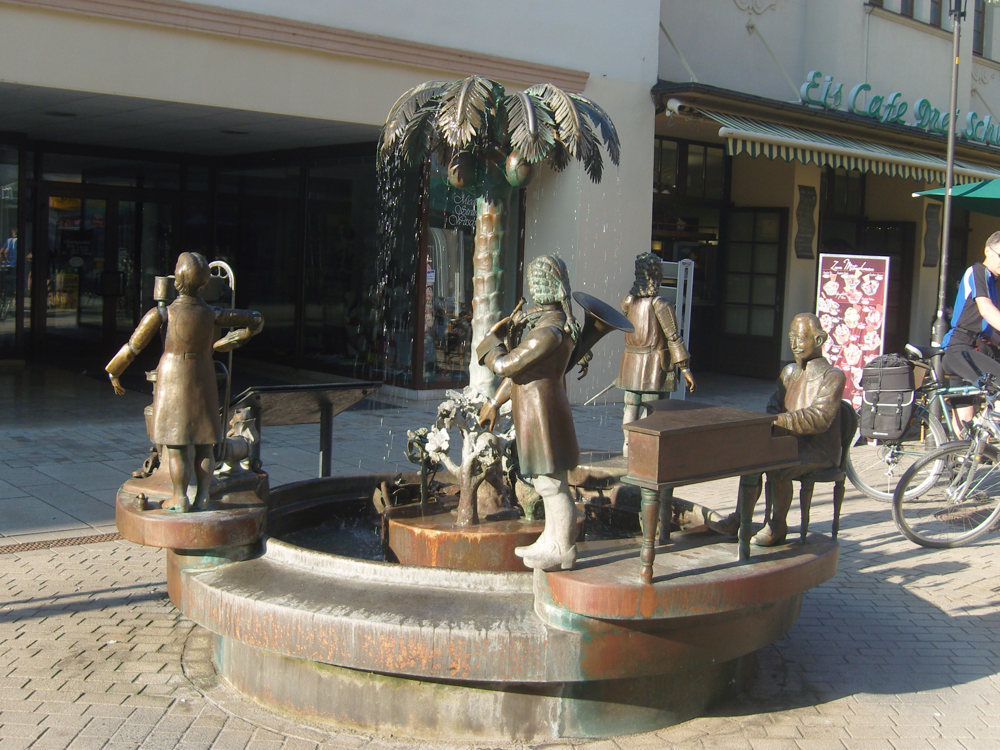 Brunnen in der Judenstraße in Weißenfels mit den Figuren von Heinrich Schütz, dem Herzogspaar, einem Schuharbeiter an der Steppmaschine in Erinnerung an die jahrhundertelange Tradition der Schuhfabrikation, die nach 1989 zusammenbrach - geschaffen von Bonifatius Stirnberg